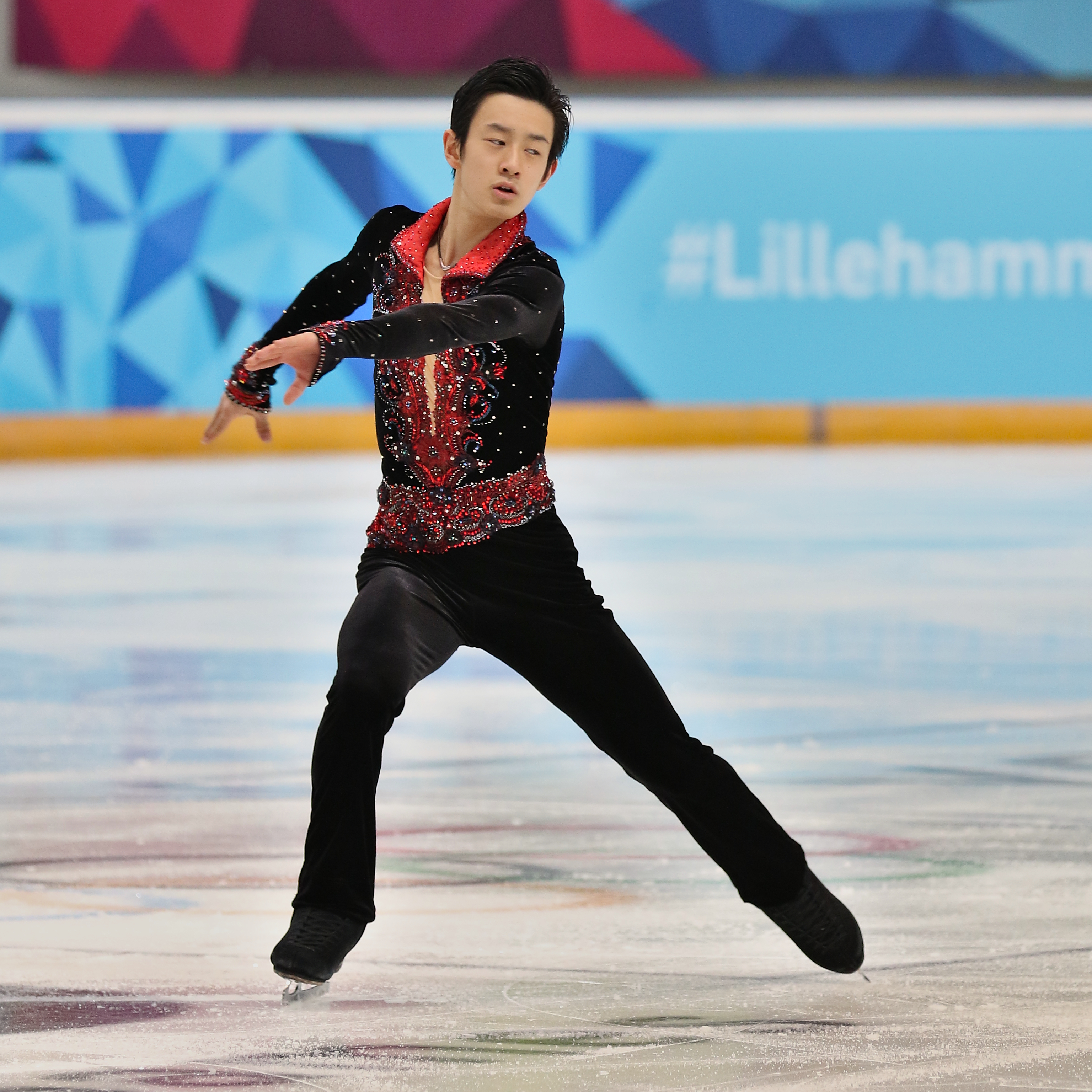 Lillehammer 2016 - Figure Skating Men Short Program - Sota Yamamoto